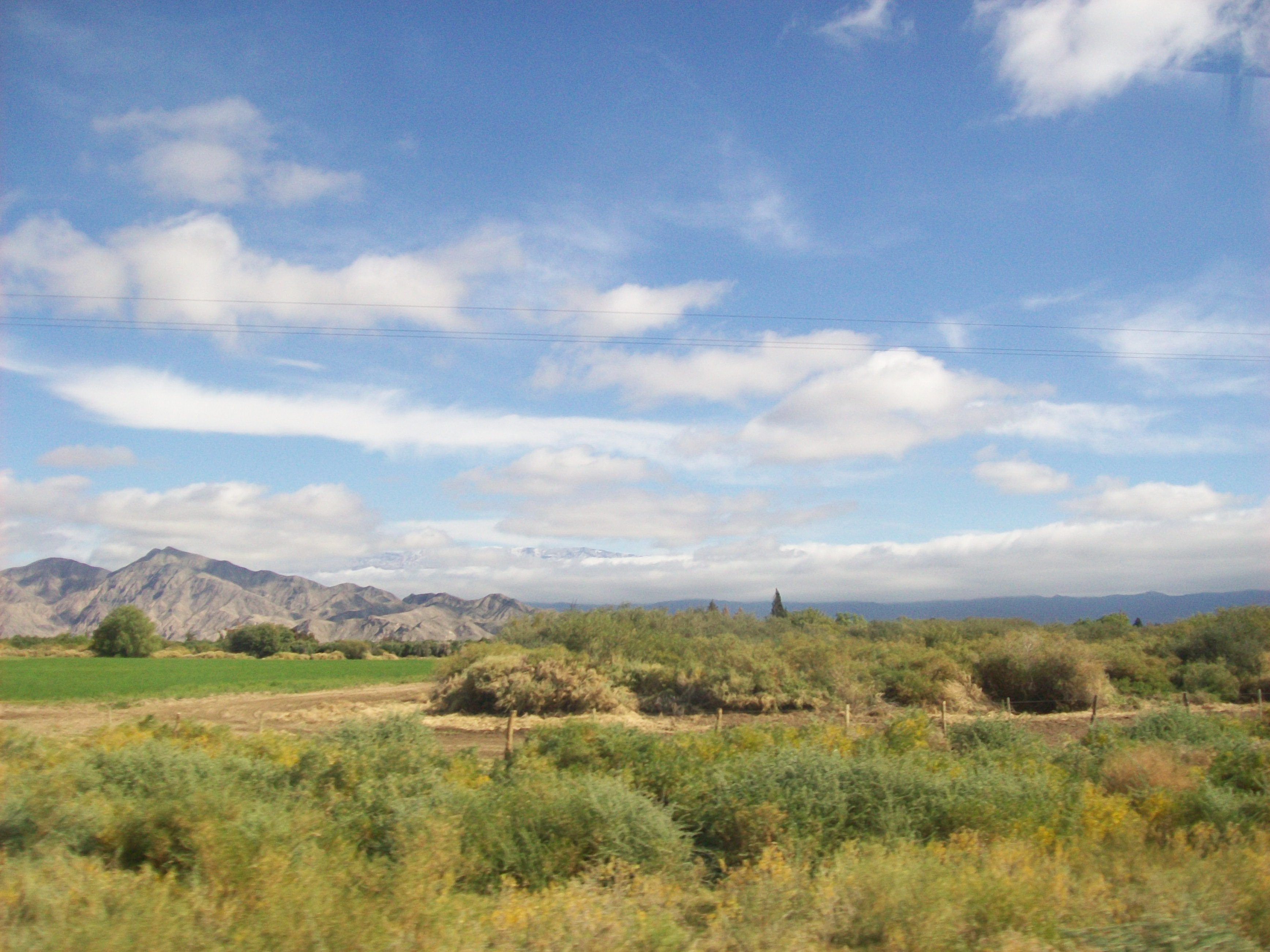 Vista de un típico paisaje del Valle de Jáchal en la provincia argentina de San Juan